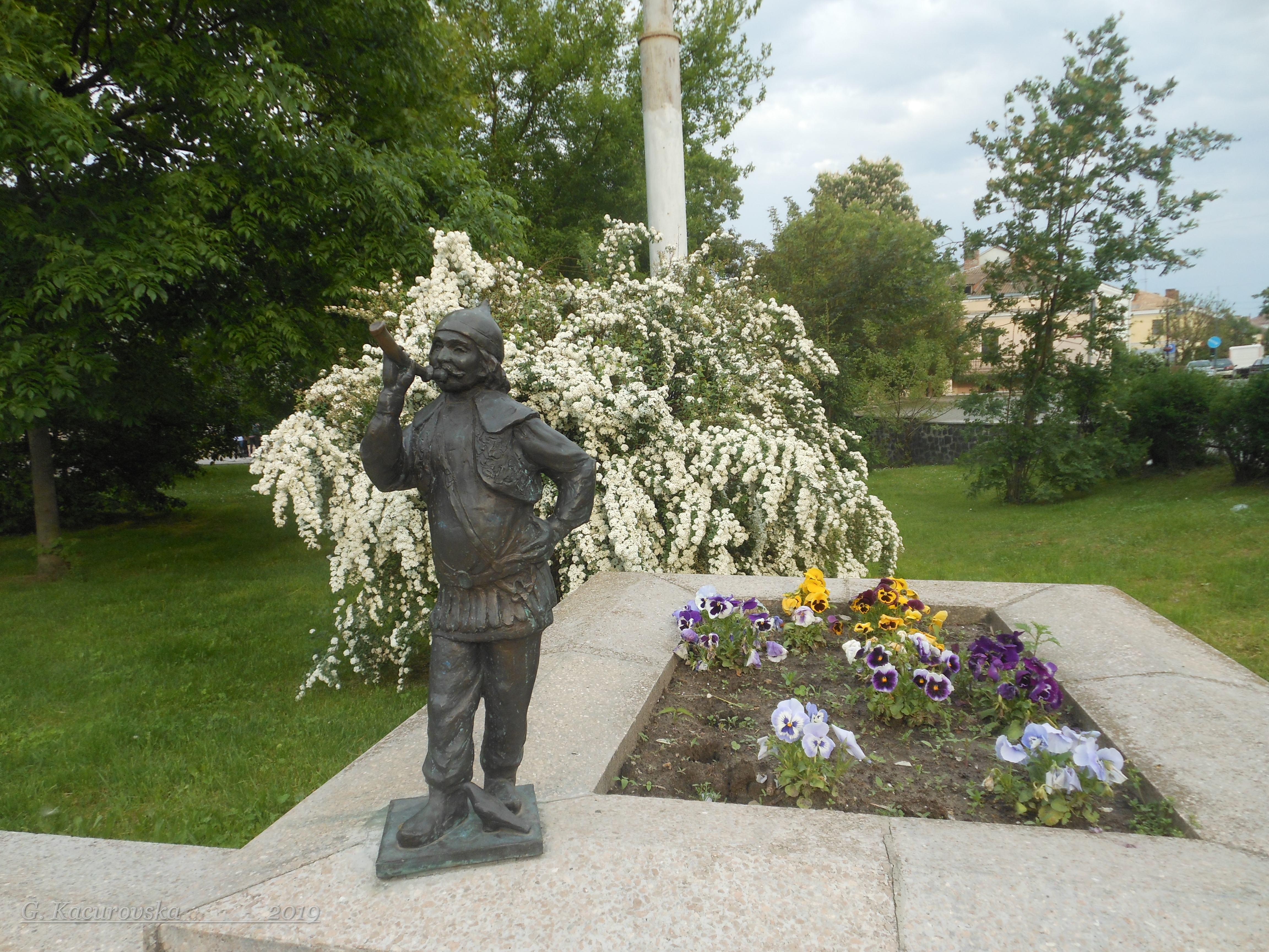 Луцьк міні-скульптупа біля Братського мосту